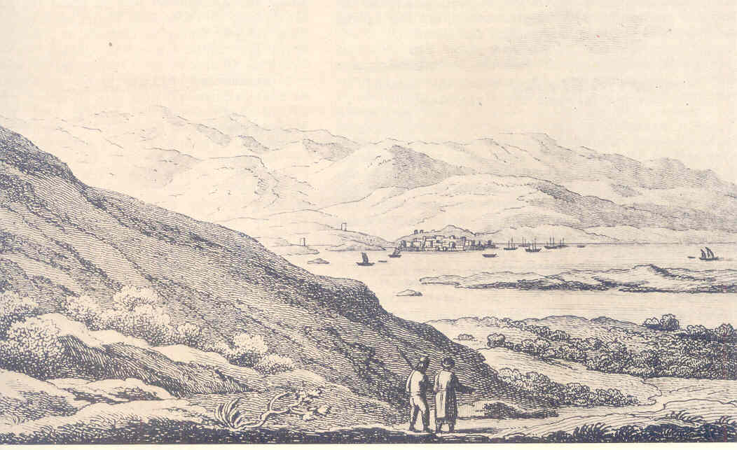 Το Γαλαξίδι σε χαλκογραφία εποχής